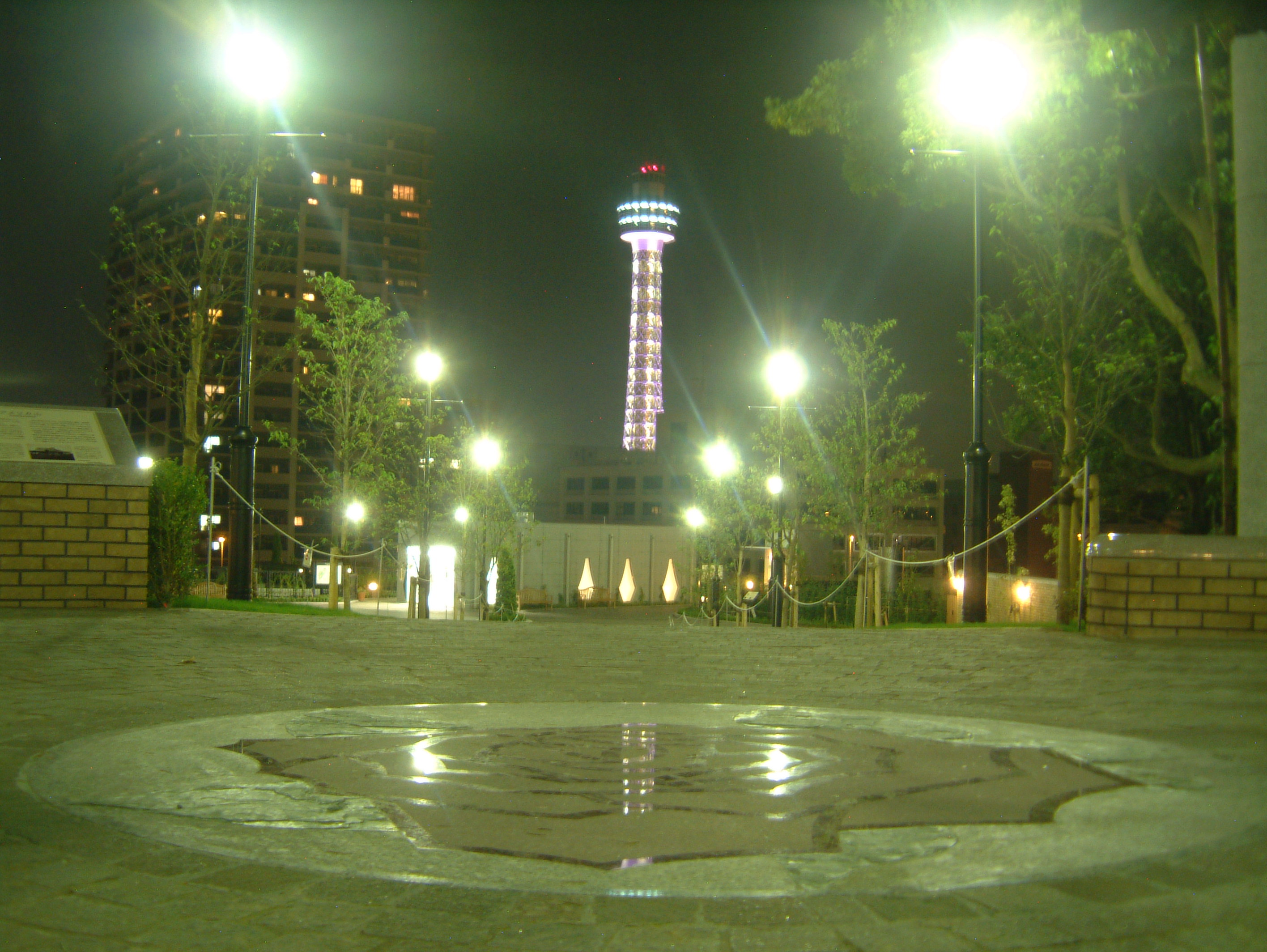 アメリカ山公園（横浜市中区）の夜景。マリンタワーが見える。